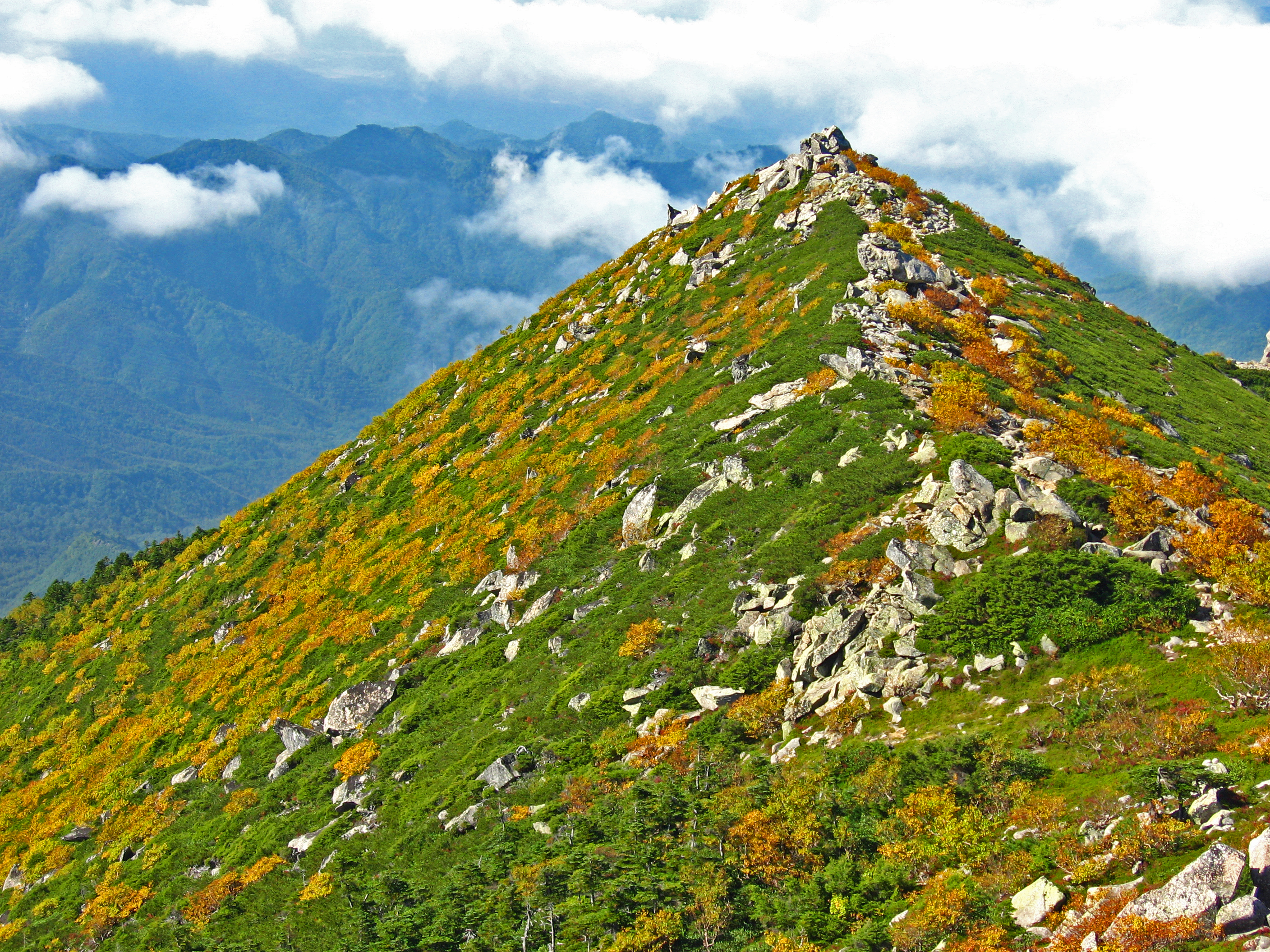 奥秩父・金峰山より西側を望む。緑はハイマツ、黄はダケカンバの黄葉。